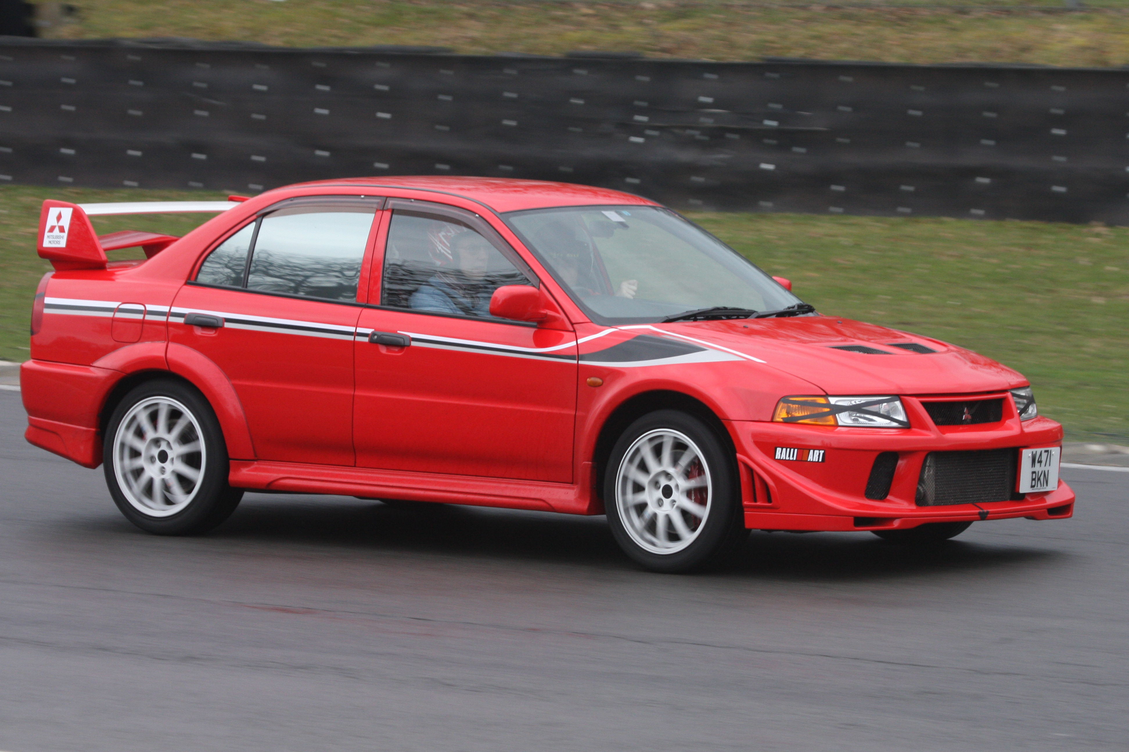 Mitsubishi Evo 6